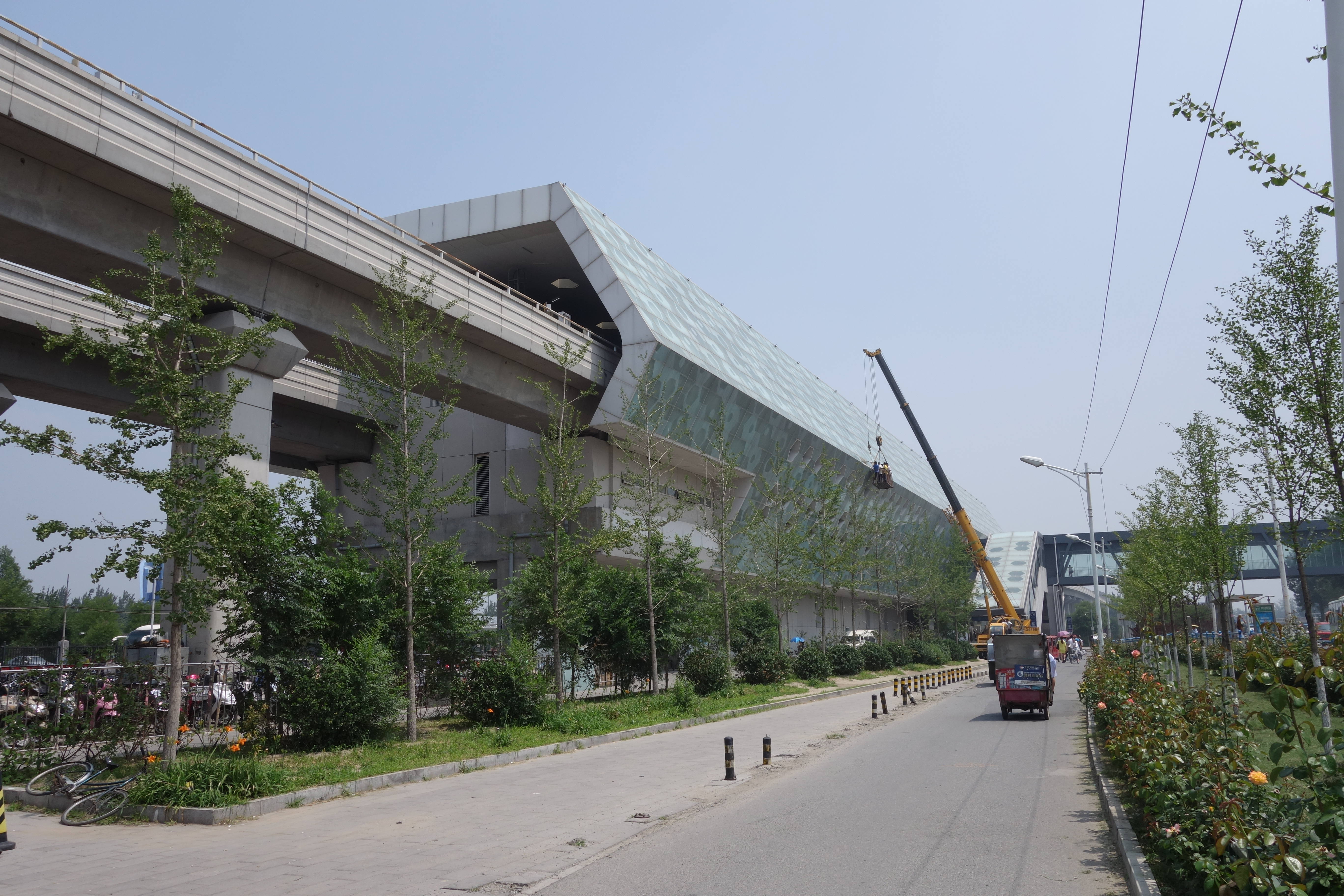 生命科学园站站外